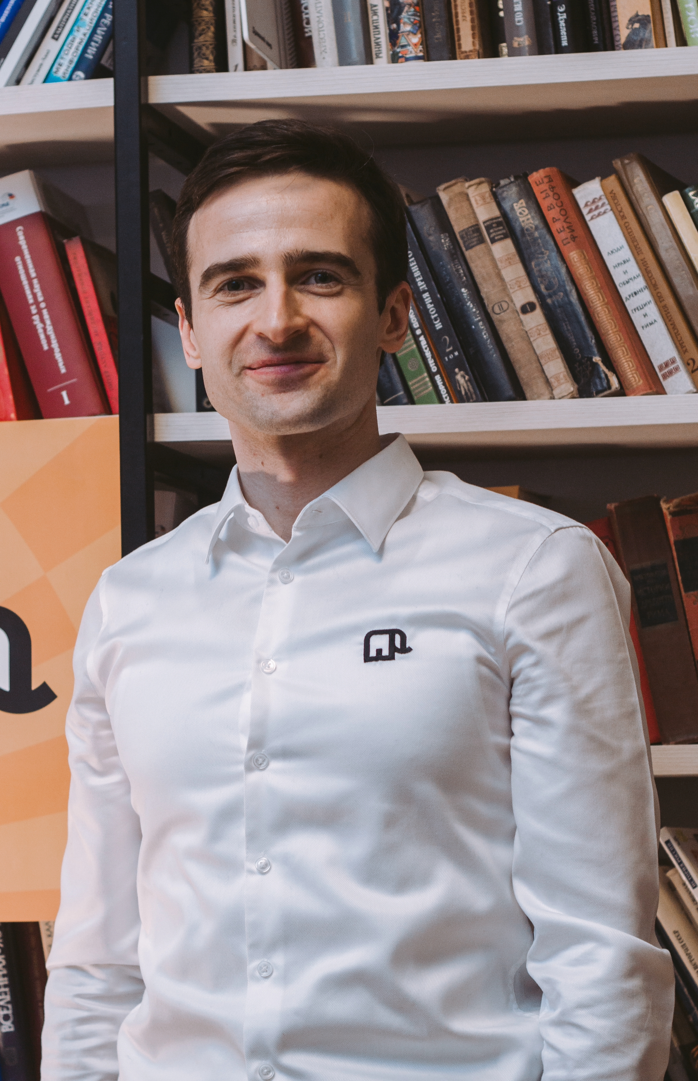 Портрет Эрнесто Инаркиева